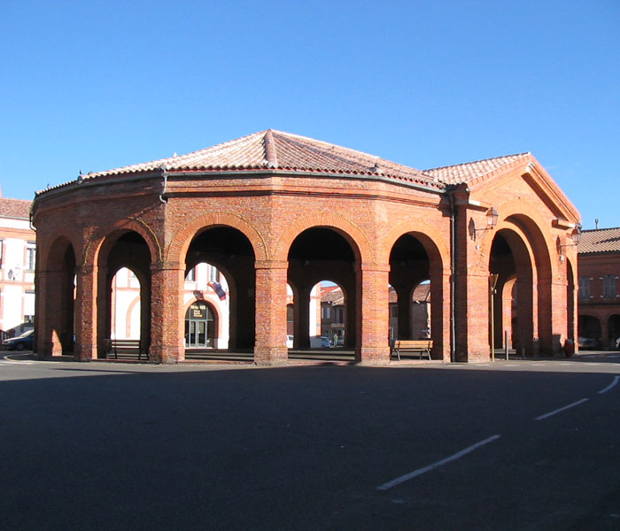 Halle de la ville de Saint-Lys, place centrale de la Bastille.